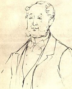 Персонаж романа "Преступление и наказание" П. П. Лужин. Рисунок П. М. Боклевского